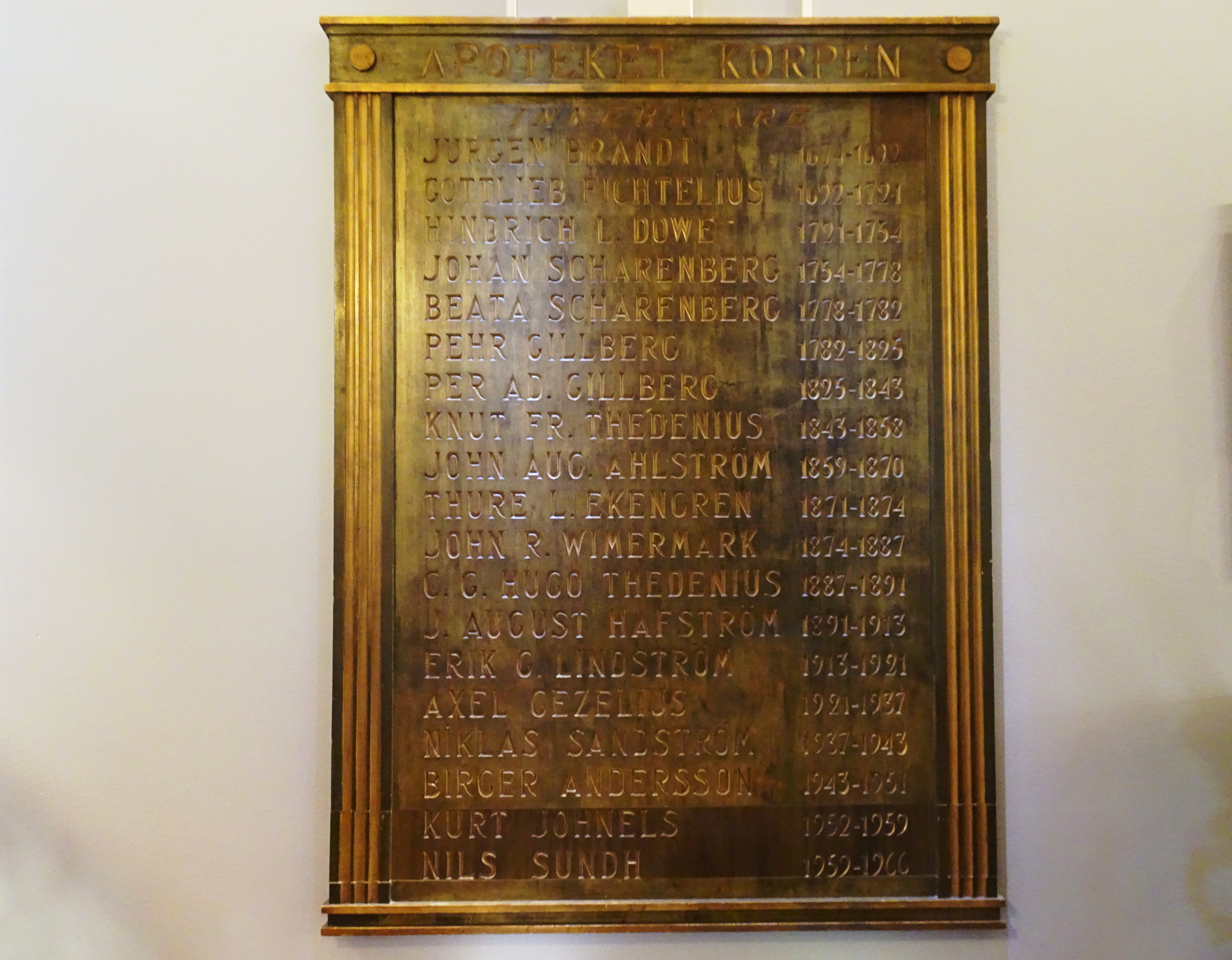 Apoteket Korpen, Västerlånggatan, Gamla stan